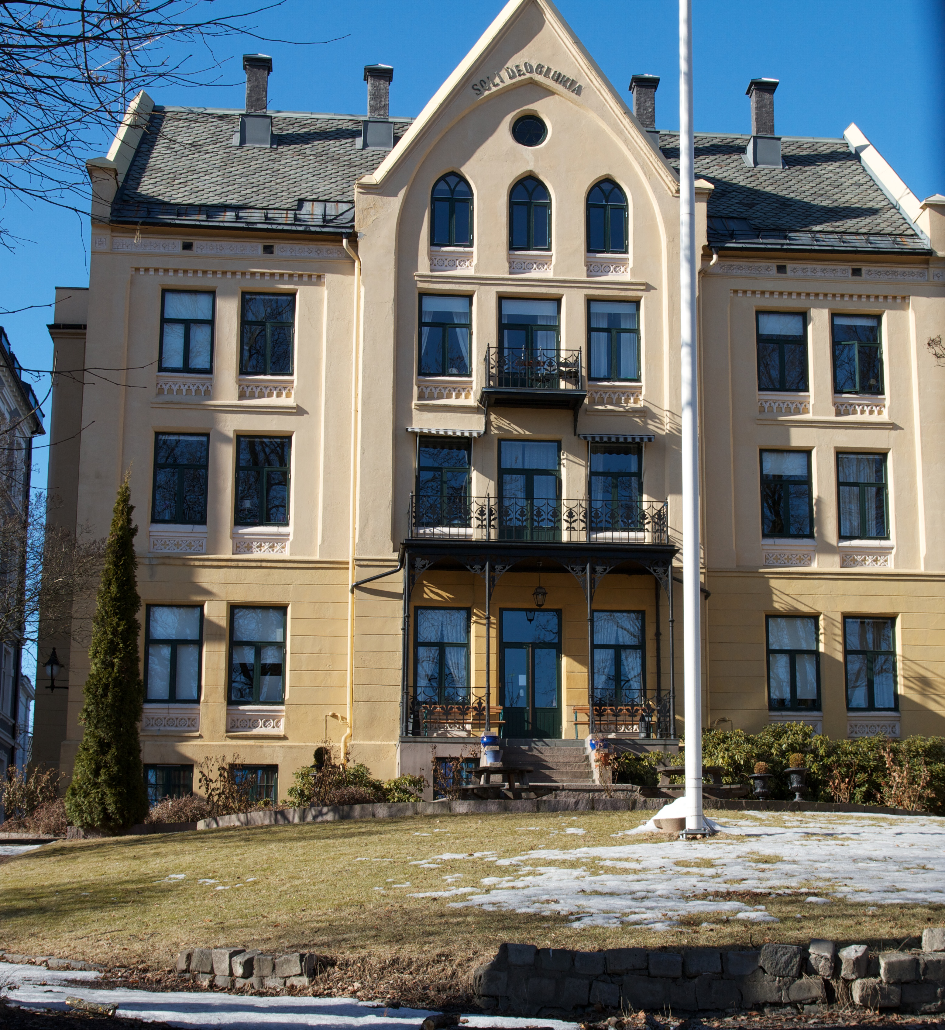 Underhaugsveien 13 ( Studenterhjemmet) i Oslo.